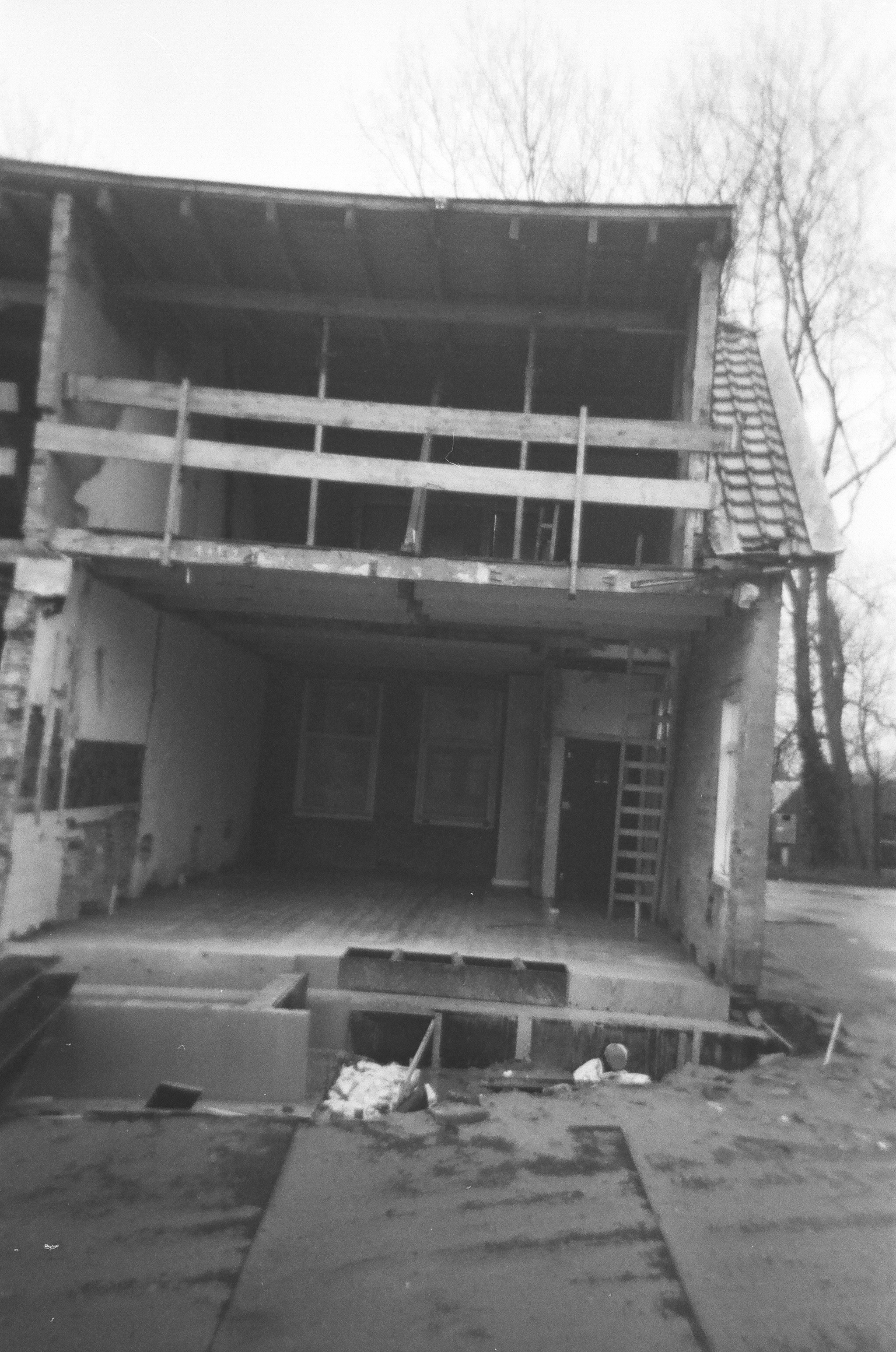 Een huis (of wat er nog van over is) tijdens de renovatie van de Rooie Buurt (Katwijk). Eigen foto.